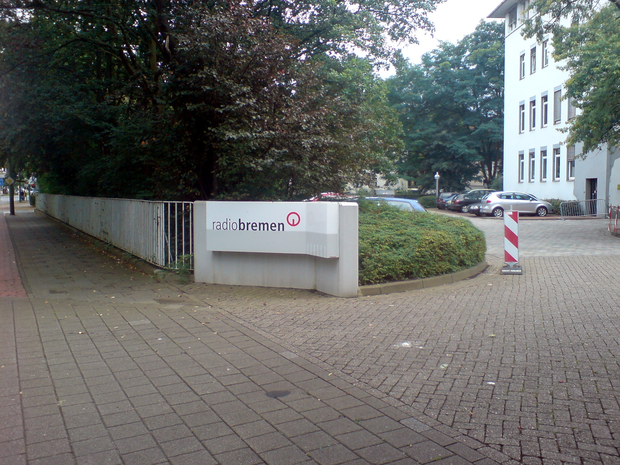 Eingang zum Radio-Bremen-Hörfunk am ehemaligen Standort in der Bürgermeister-Splitta-Allee.